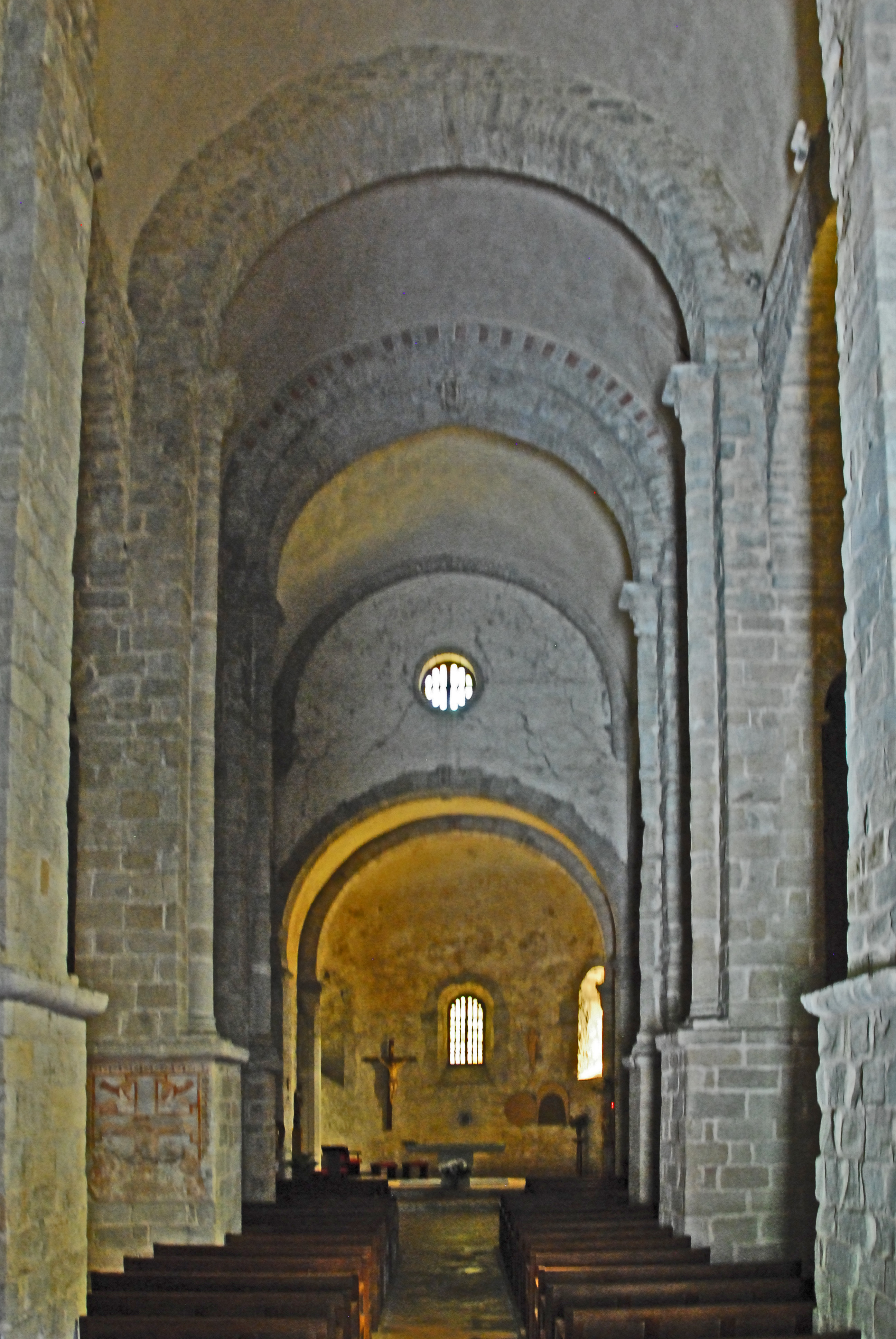 St-André-de-Sorède, Schiff zum Chor